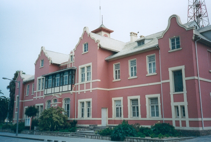 Auteur de la photo : FC Georgio Sujet : Hopital franciscain de Swakopmund (1907) Année : 1996